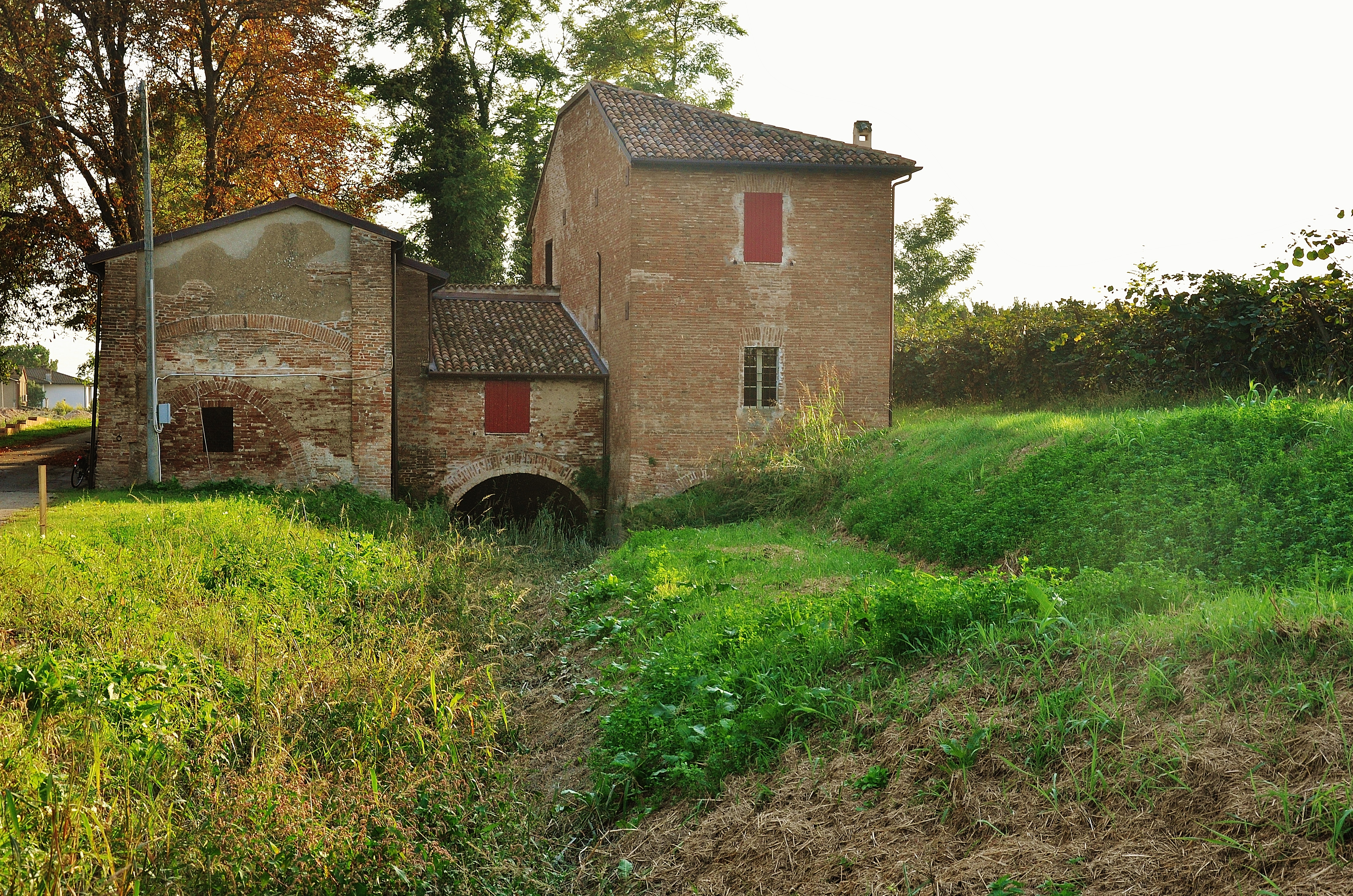 Mulino scodellino This is a photo of a monument which is part of cultural heritage of Italy.